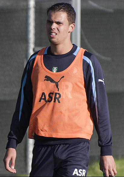 Kaj Ramsteijn and Mitchell te Vrede during a training with Feyenoord Rotterdam.